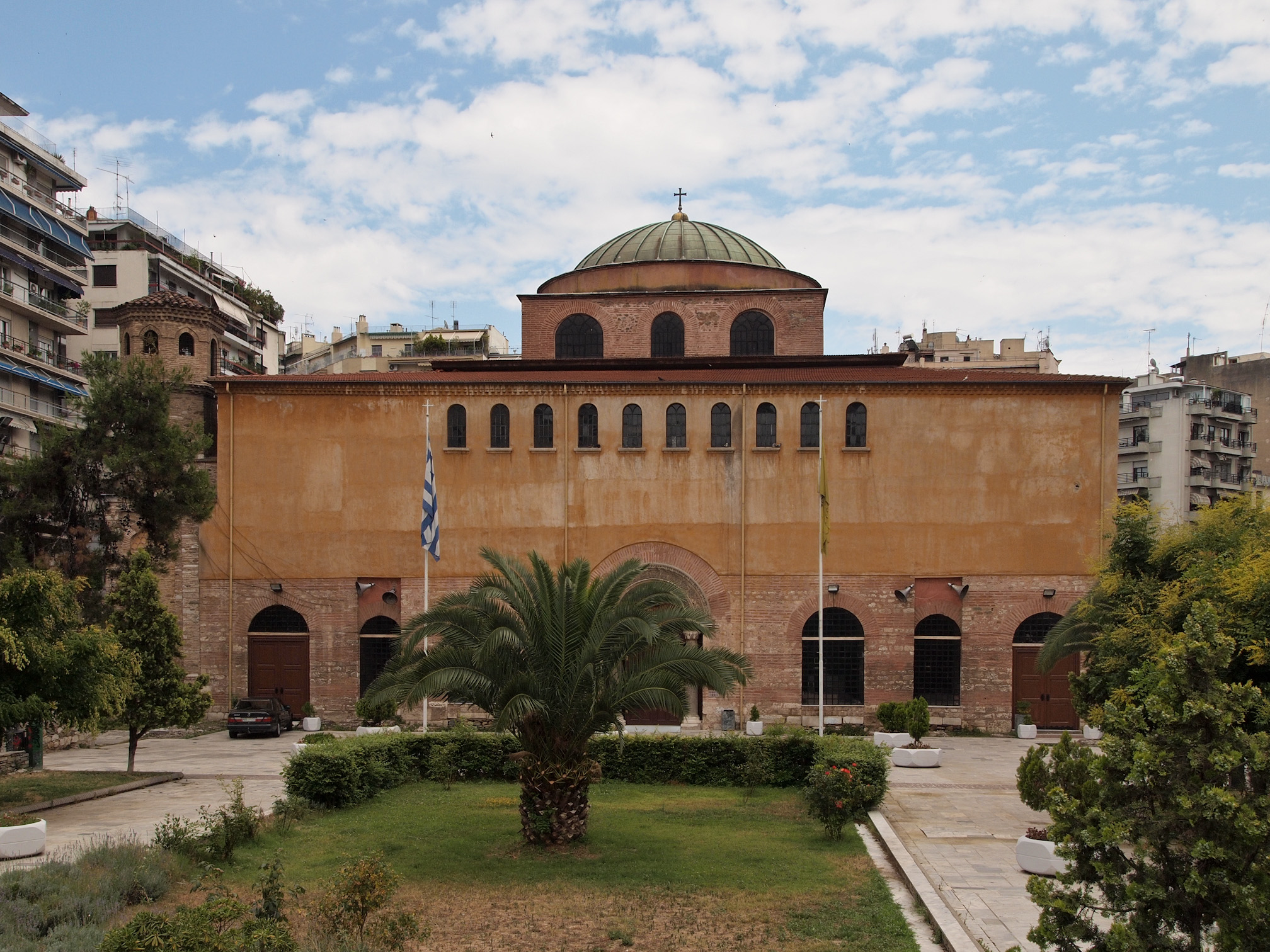 Храм Святой Софии